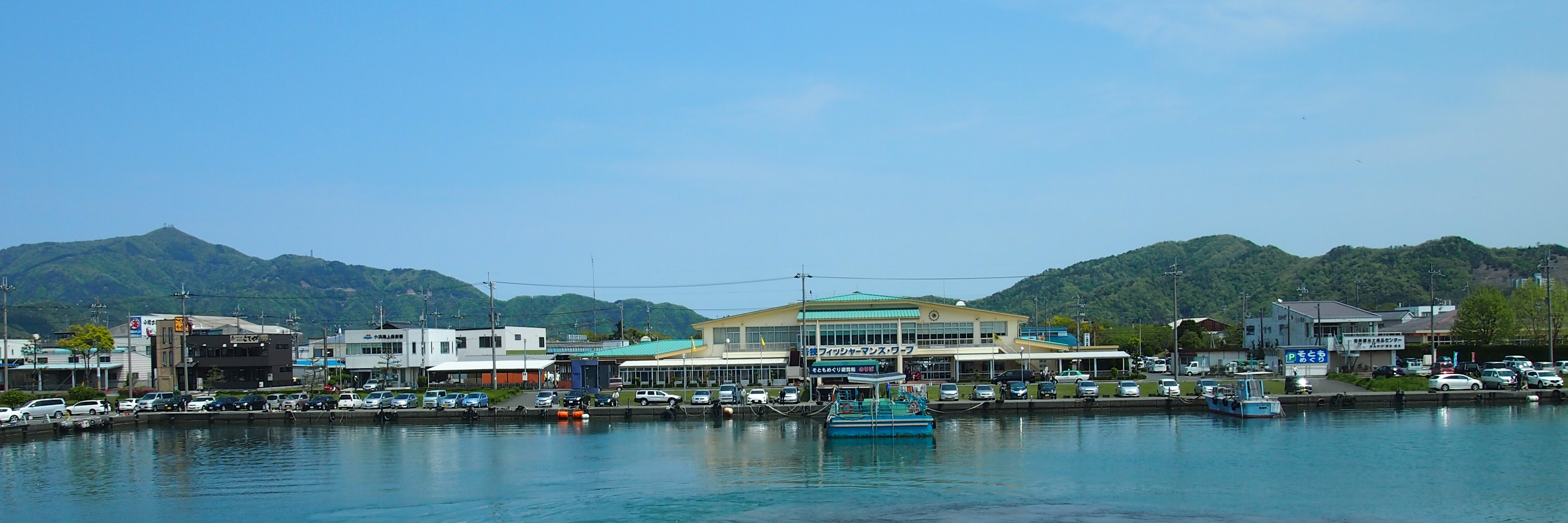 福井県小浜市の小浜漁港